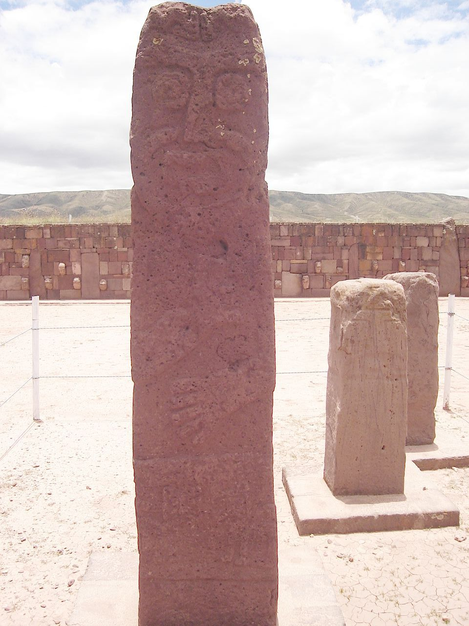 Foto tirada por mim, em Tiwanaku.